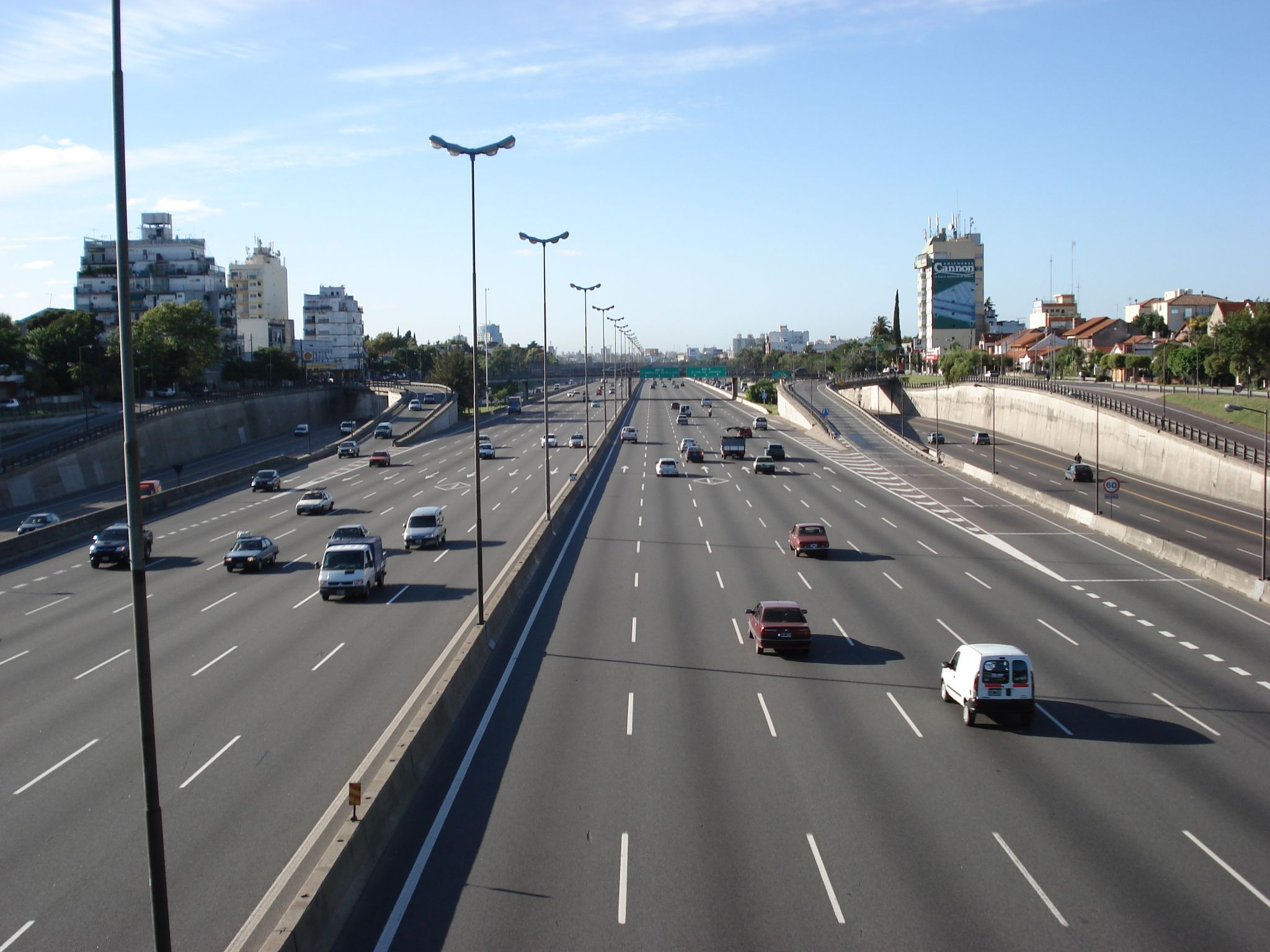 Autopista Panamericana, imagen tomada sobre el puente Pte. H. Yrigoyen con dirección sur (aprox. a 20 cuadras para ingresar a la Ciudad de Buenos Aires, Argentina)